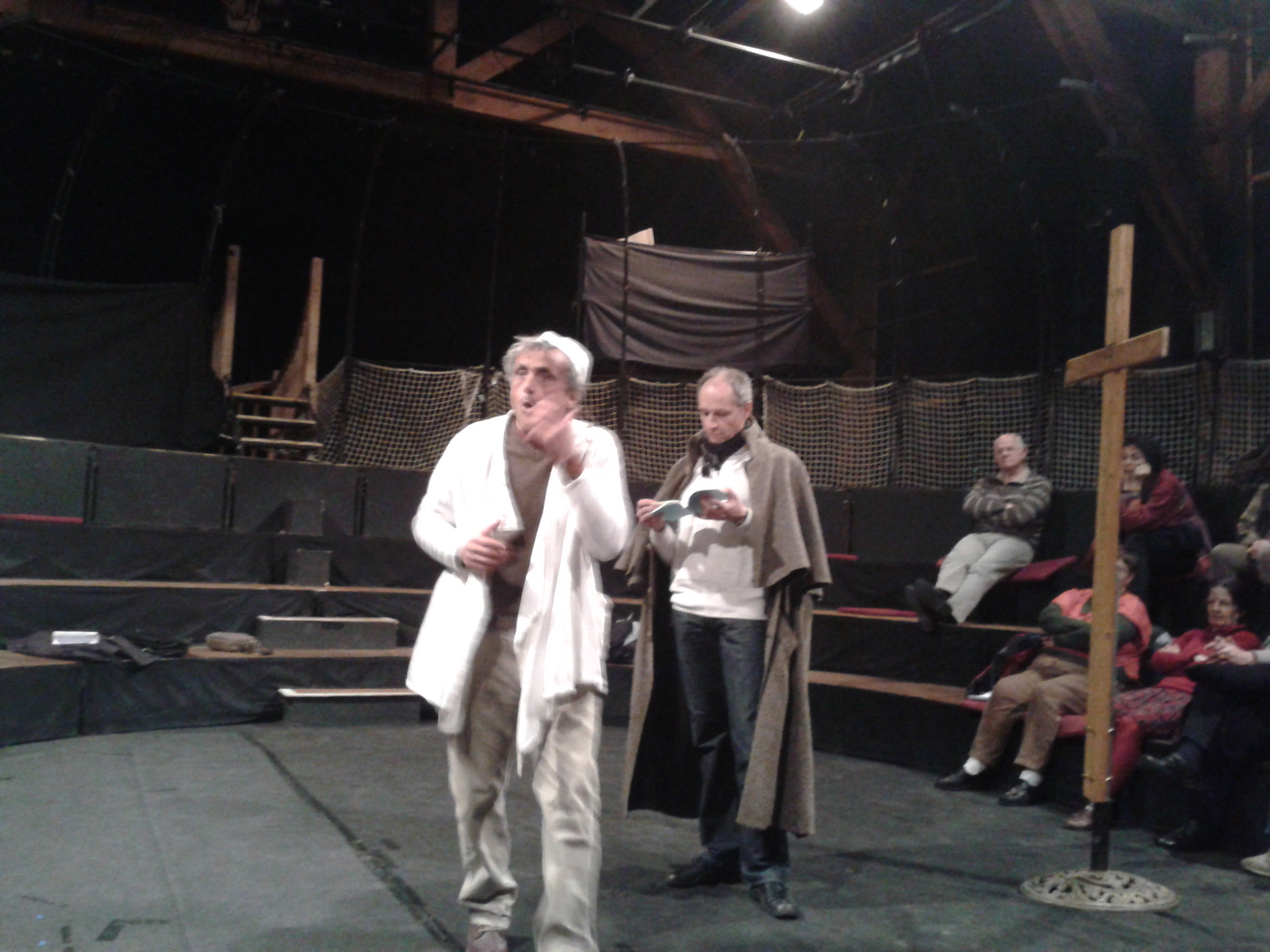 Don Juan répétition TRAC Beaumes-de-Venise